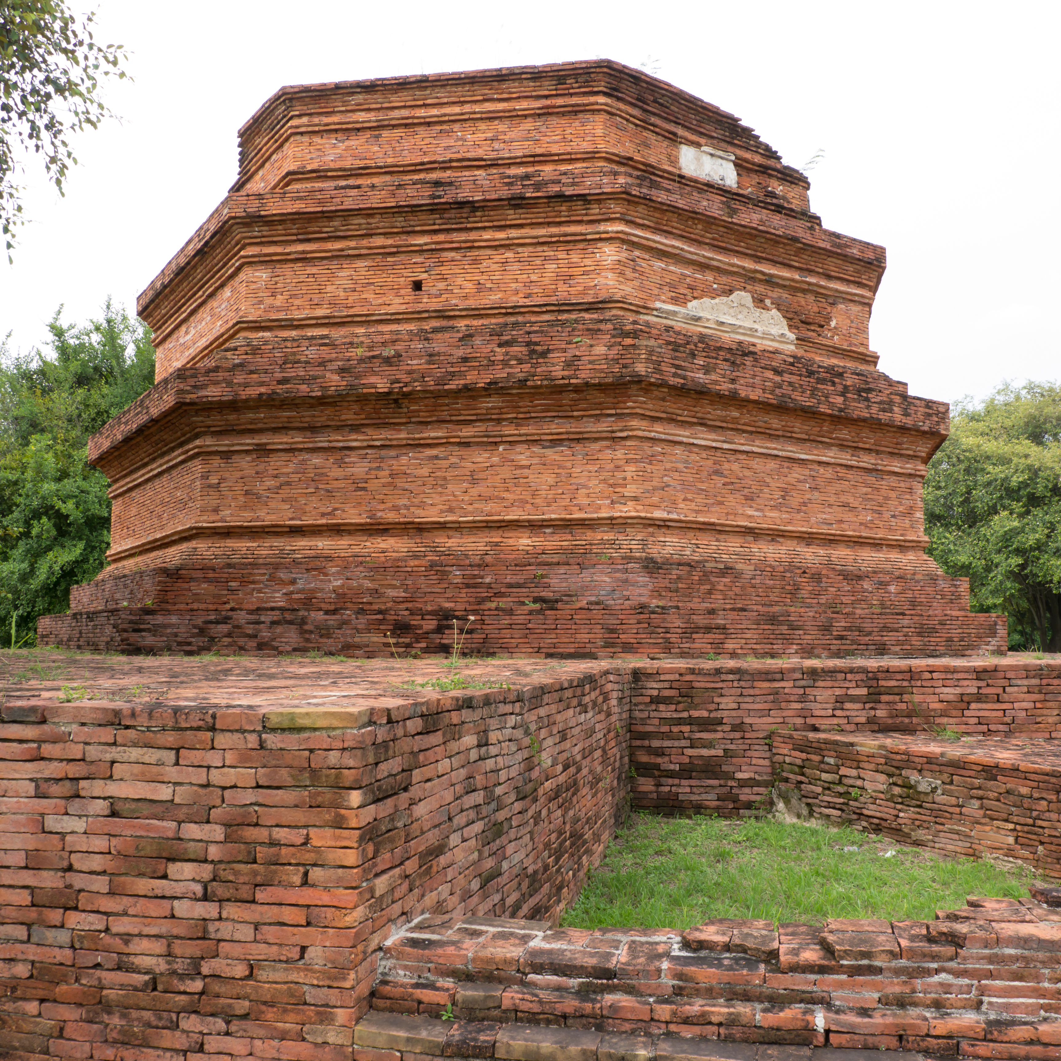 วัดวังชัย